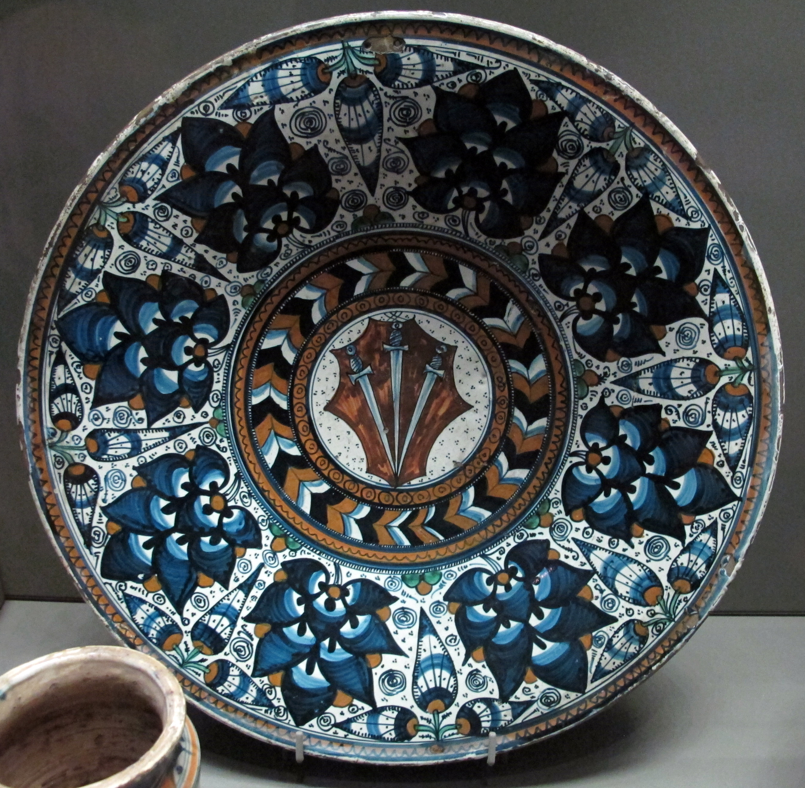 Maiolica in the Louvre